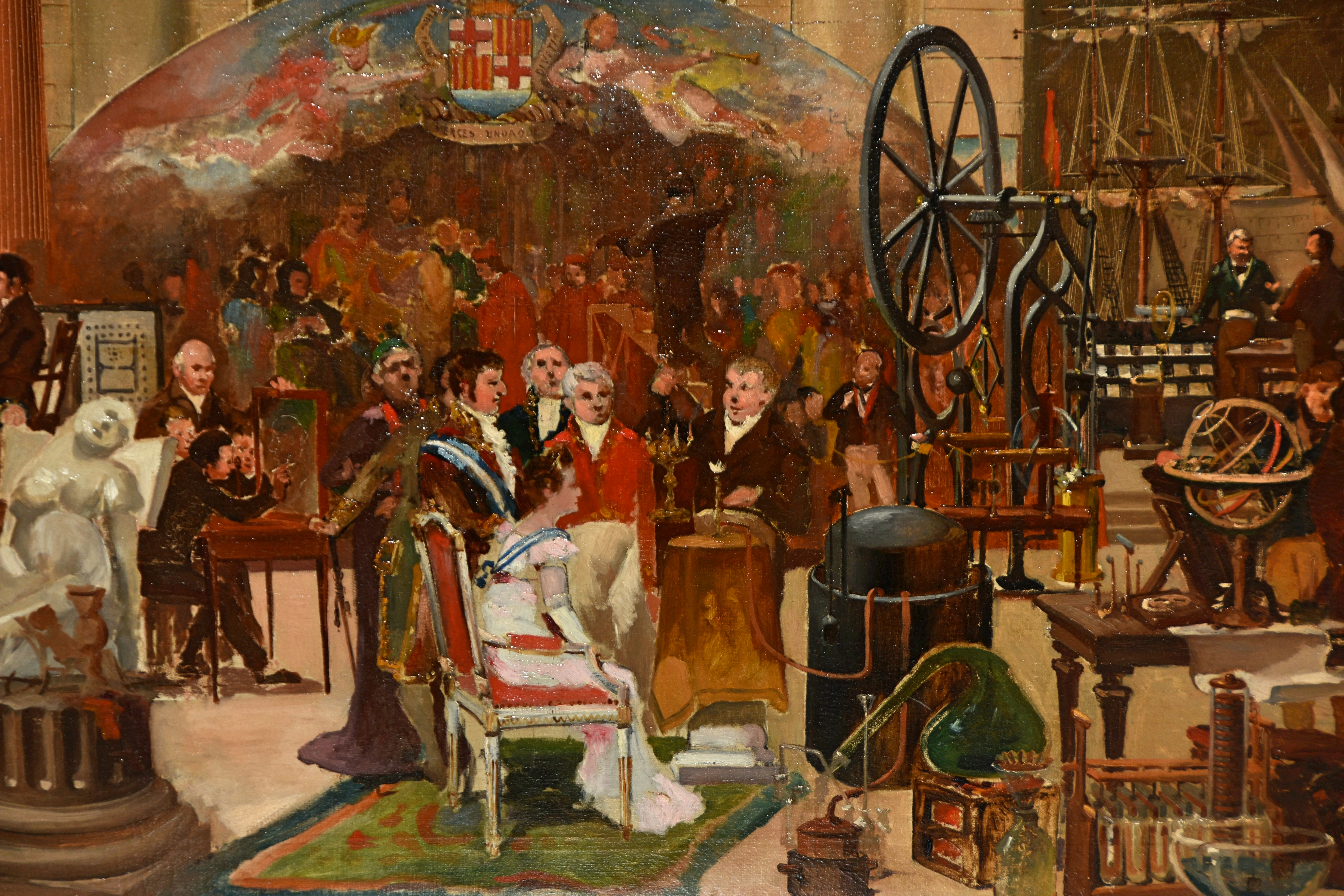 Emili Casals Camps. Josep Roura explicant als reis els seus descobriments sobre il·luminacio de gas Detall del quadre "Visita dels reis Ferran VII i Maria Amàlia a Llotja l'any 1827" (Museu d'Història de Barcelona MUHBA)